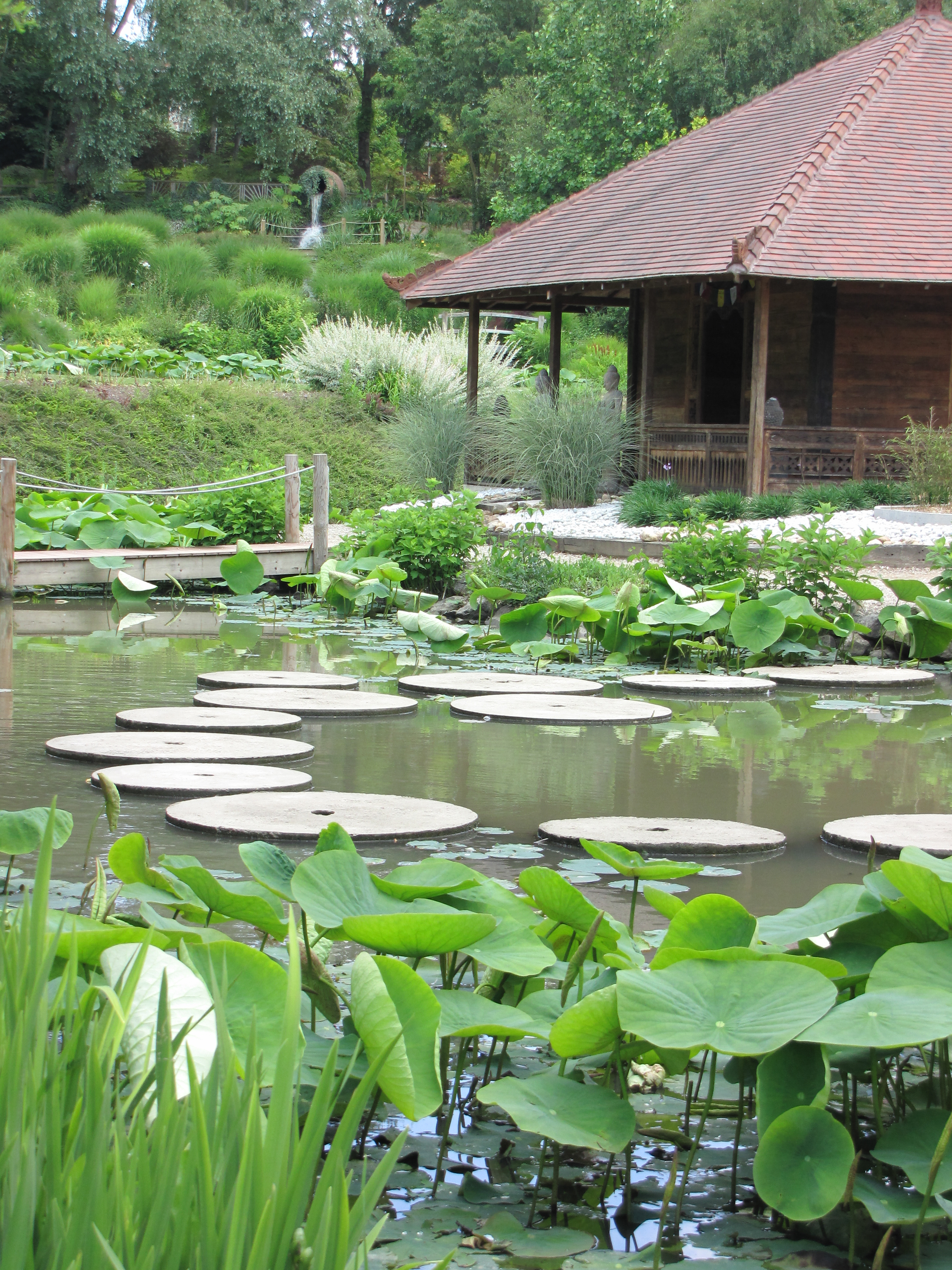 Pas japonais devant le Temple du Lotus aux jardins des Martels.